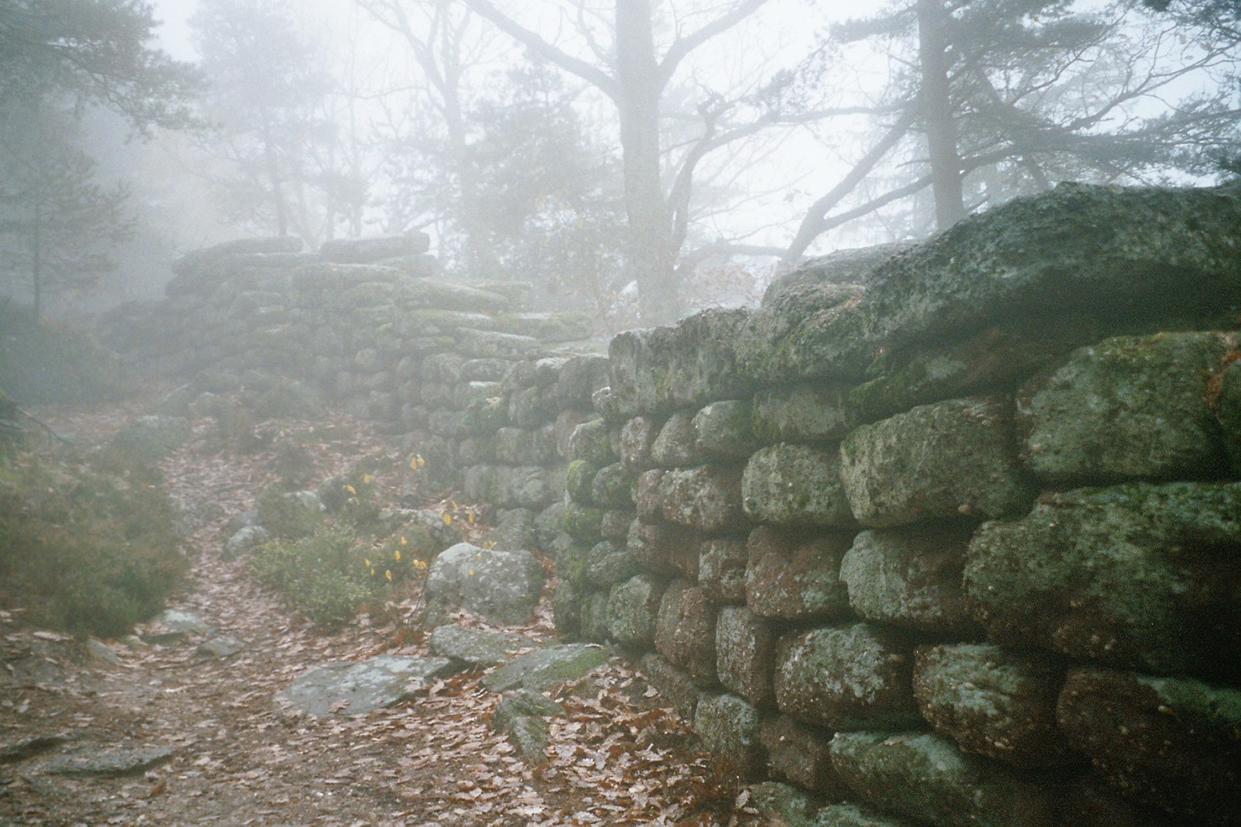 Le Mur Païen dans le brouillard.Mont Sainte-Odile,Alsace.